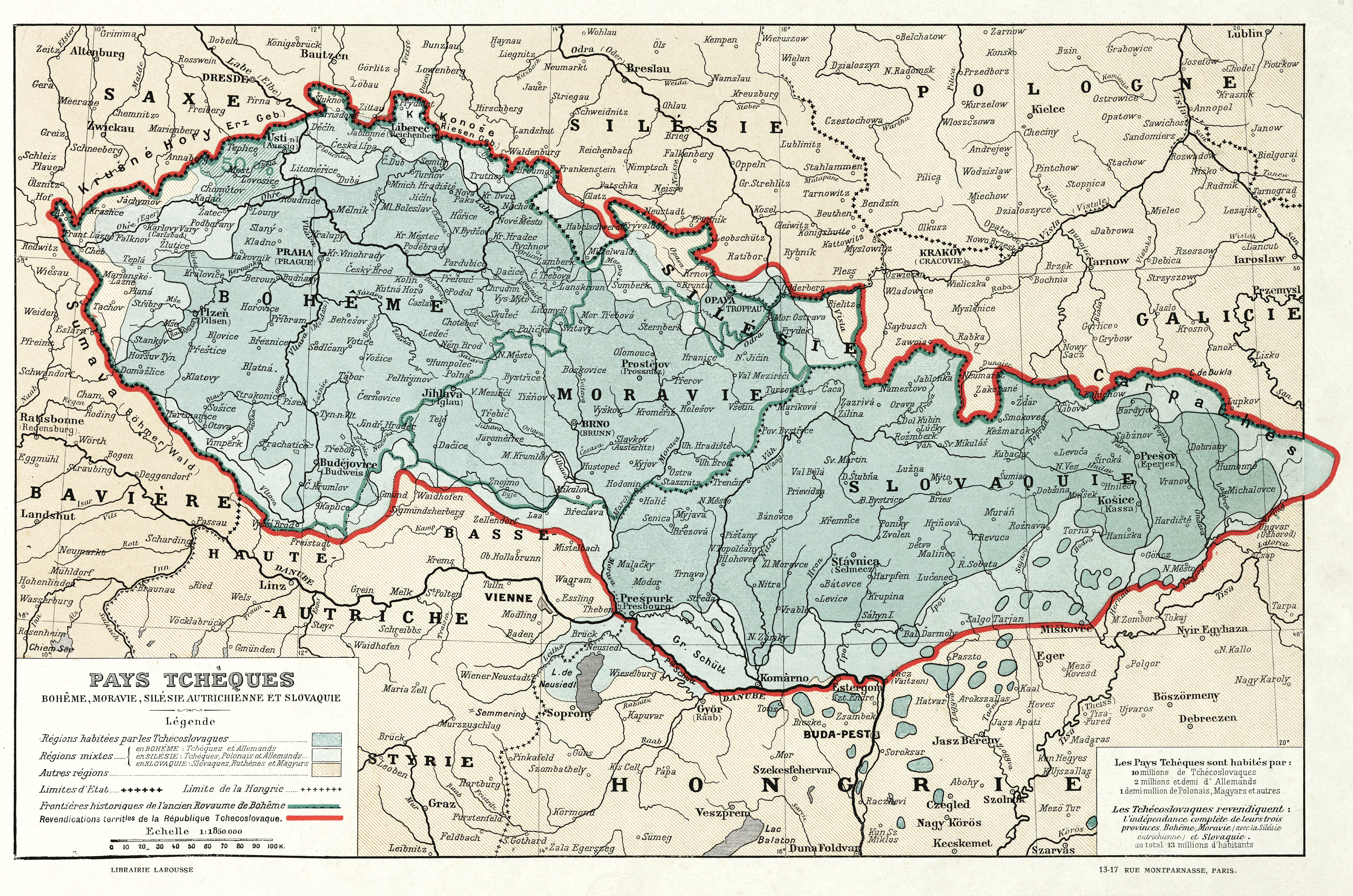 Mapa Československa pro jednání mírové konference v Paříži r. 1919.